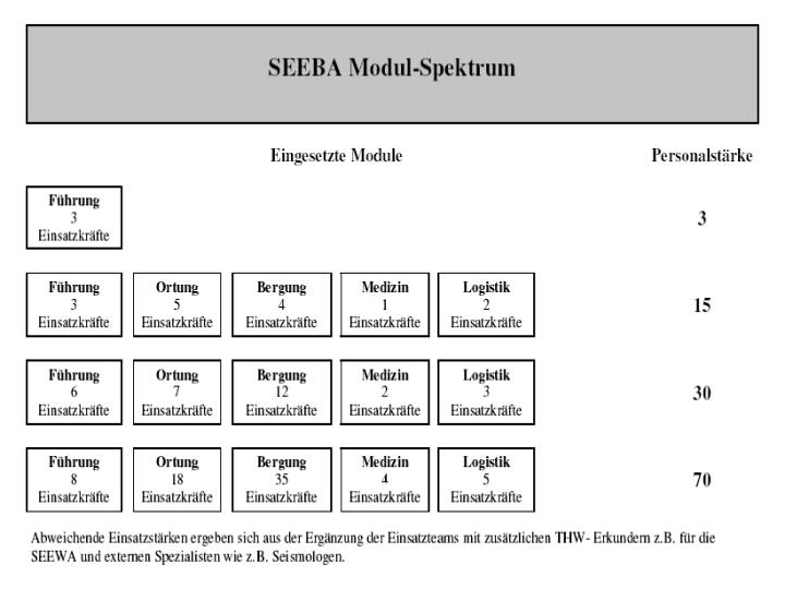 SEEBA-Module 22.11.2004 Bocholt